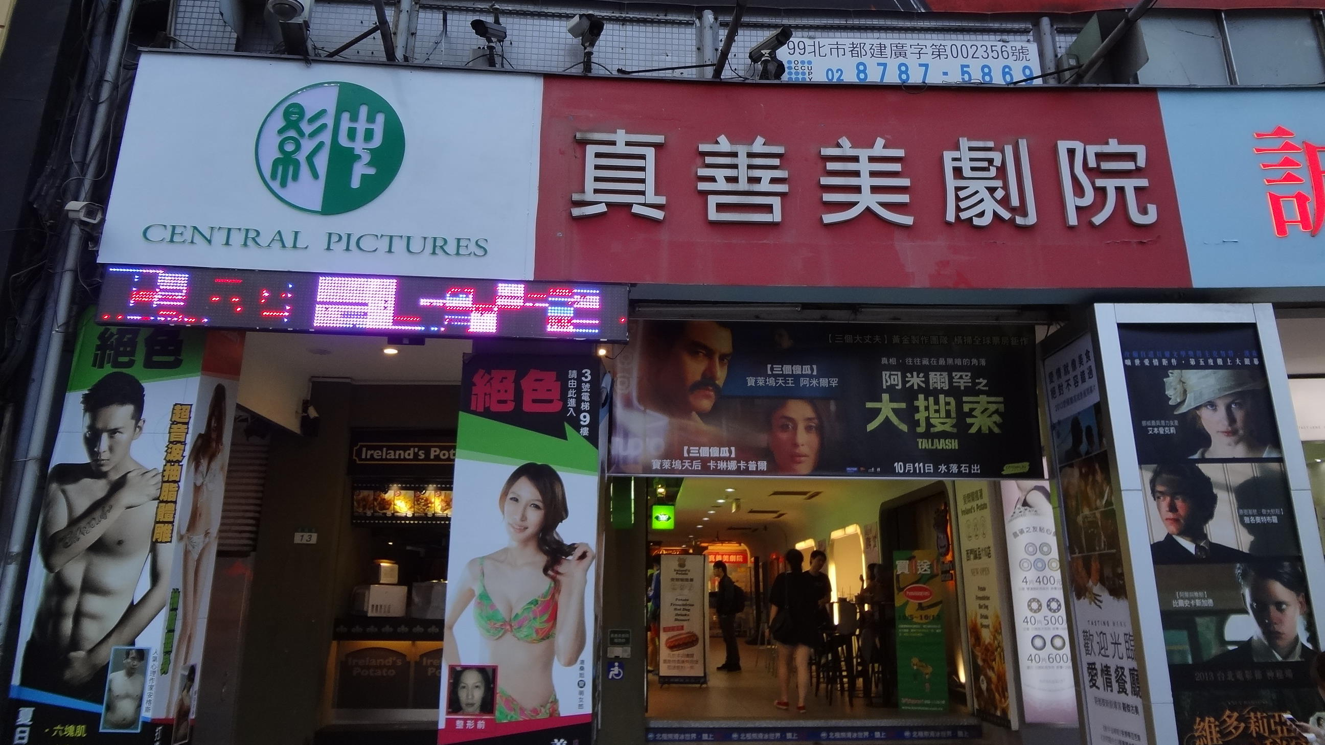 中影真善美劇院。